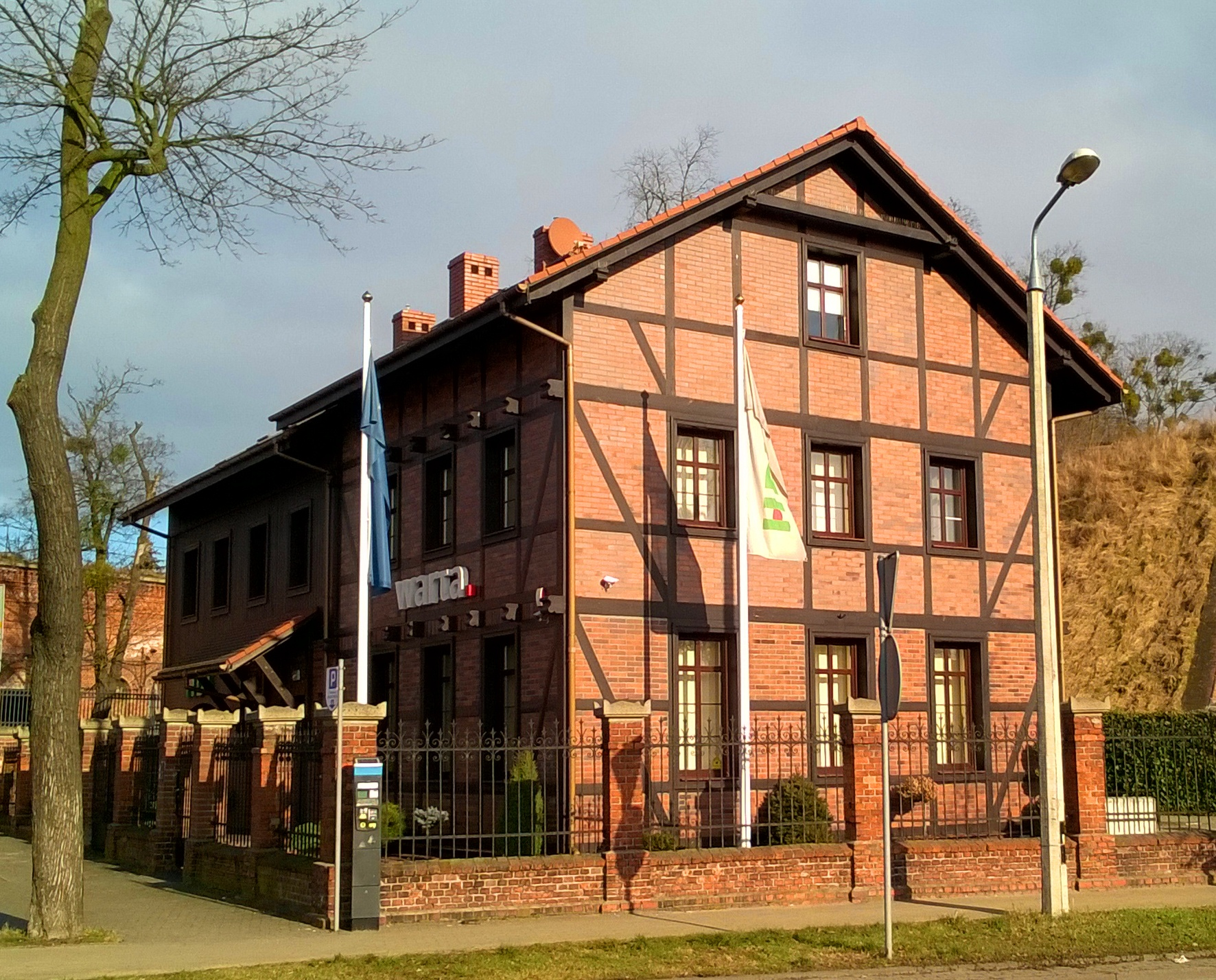 Dom zarządcy magazynów (zespół magazynów prowiantowych Twierdzy Toruń)